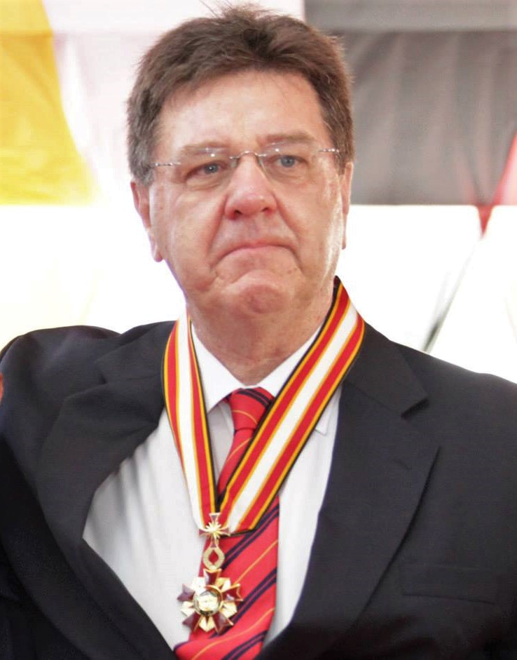 Verleihung des Ordem de Timor-Leste, 30. August 2014. Robert Peter Domm